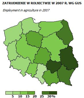 zatrudnienie w rolnictwie w poszczególnych województwach w Polsce w 2007 r.